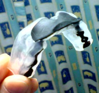 mousepiece